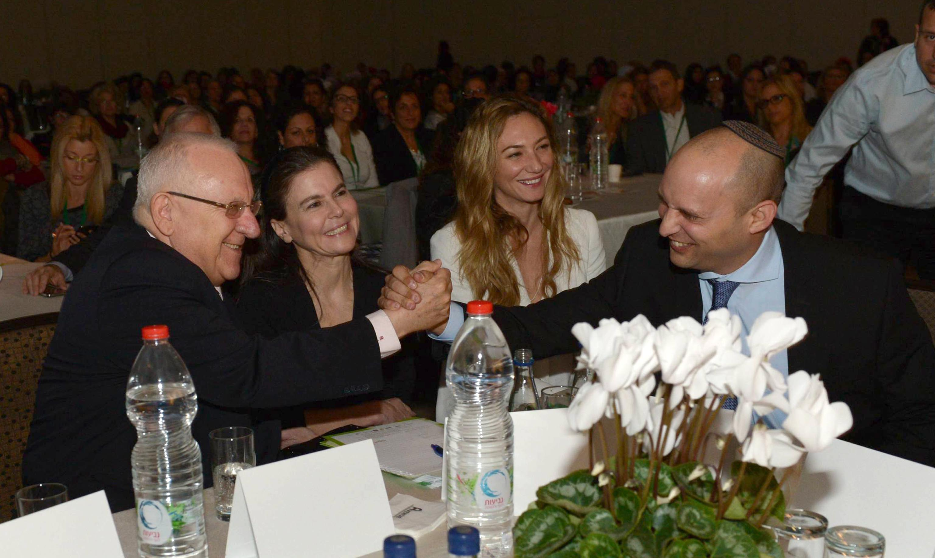 נשיא המדינה בוועידת יסמין השנתית לקידום עסקים קטנים ובינוניים העומדת בשנת 2014 בסימן עסקים בבעלות נשים כמנוע צמיחה כלכלי. עם נפתלי בנט, מיכל אנסקי ועופרה שטראוס